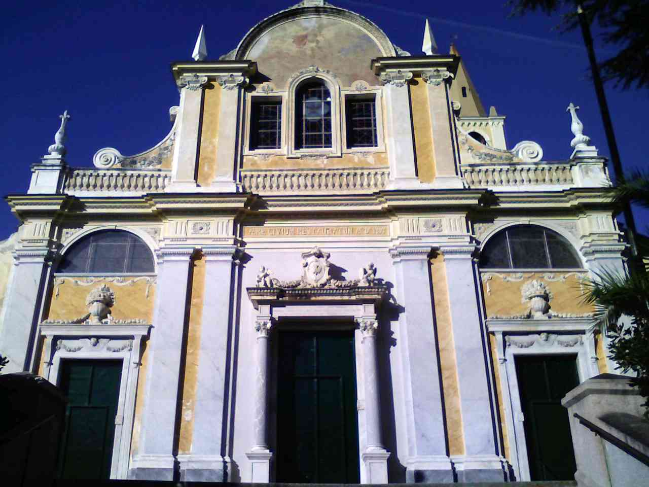 Parrocchiale di San Michele in Celle Ligure (Italy)